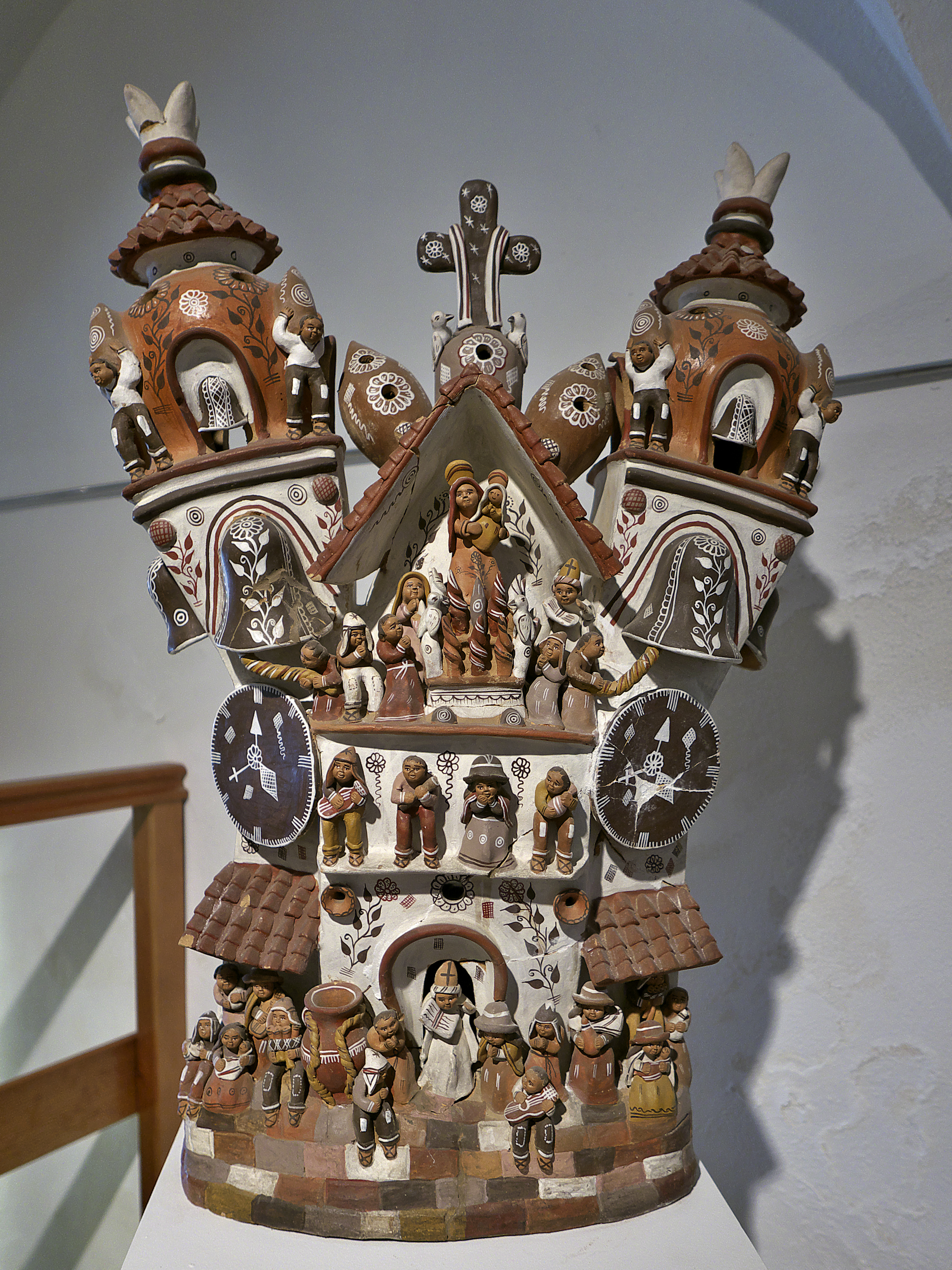 Muestra de cerámica decorada con engobes